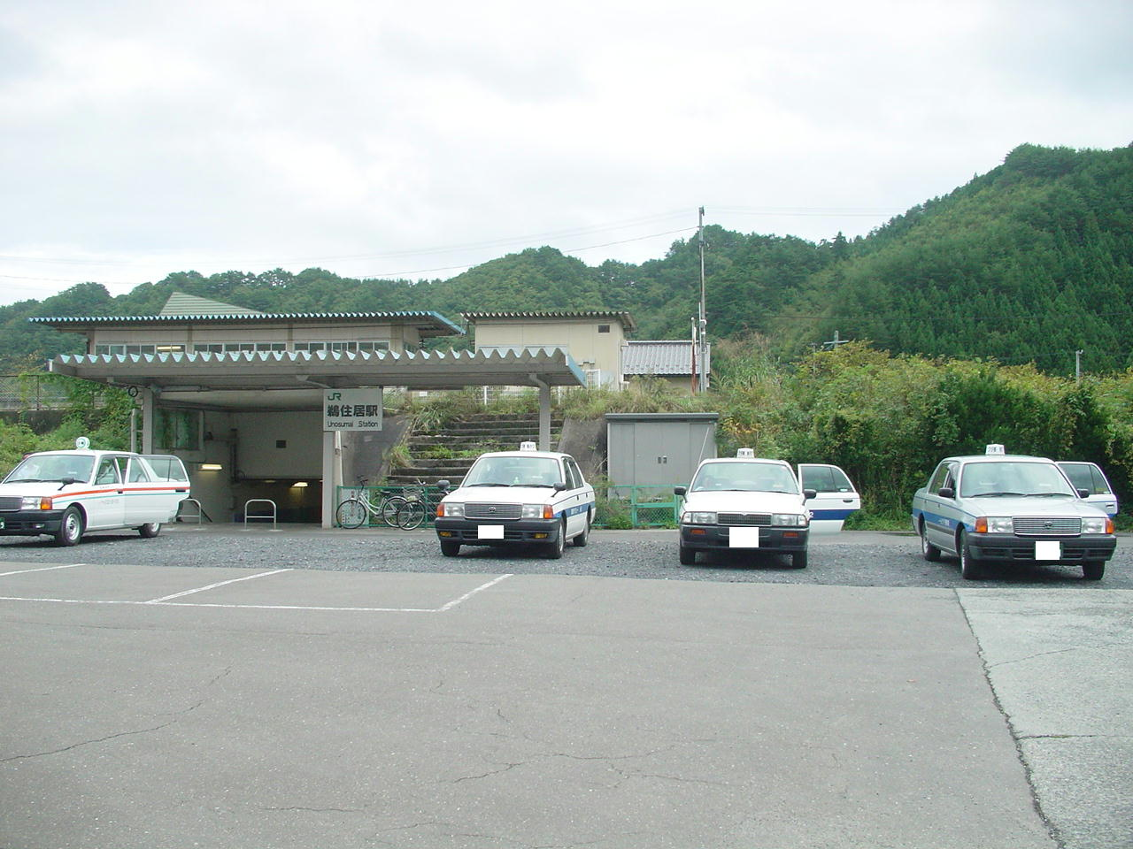 （鵜住居駅駅舎）